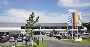 Dieses Bild zeigt das Firmengelände des Unternehmens RATIONAL AG von außen.